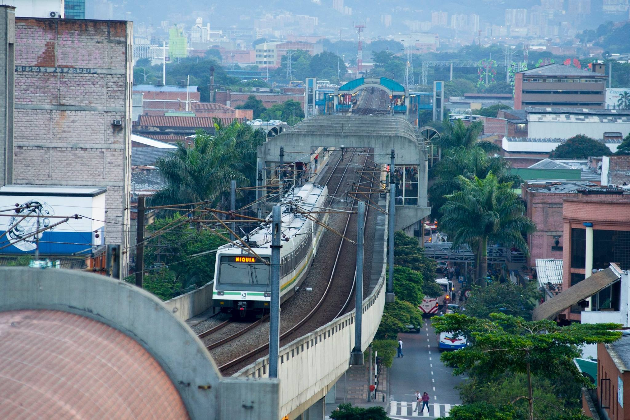 Estación Alpujarra (Metro de Medellín)